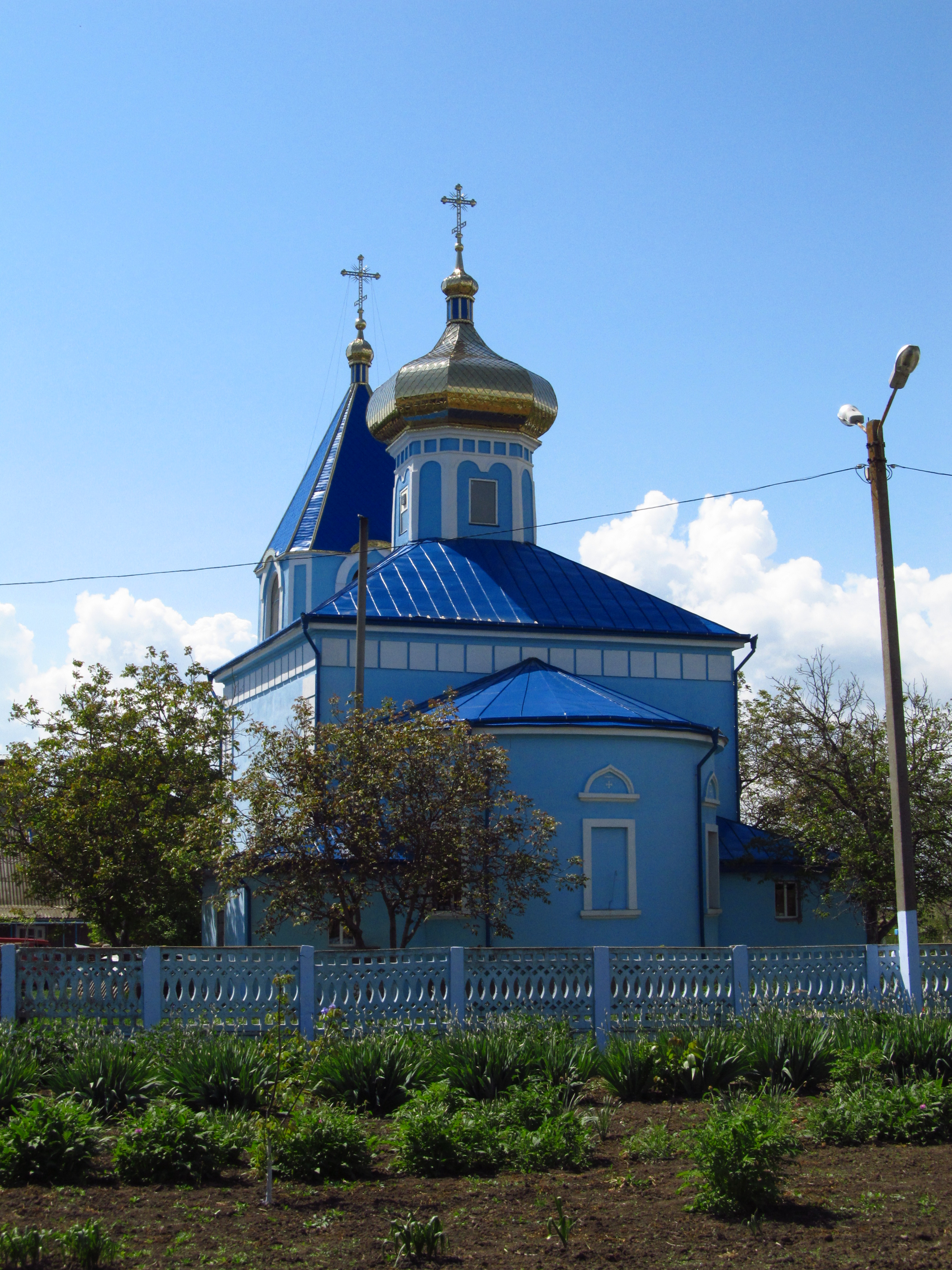 Церква Св. Георгія, с. Дмитрівка